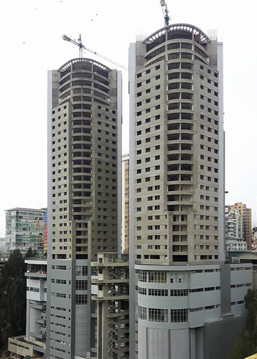 Torres del Poeta